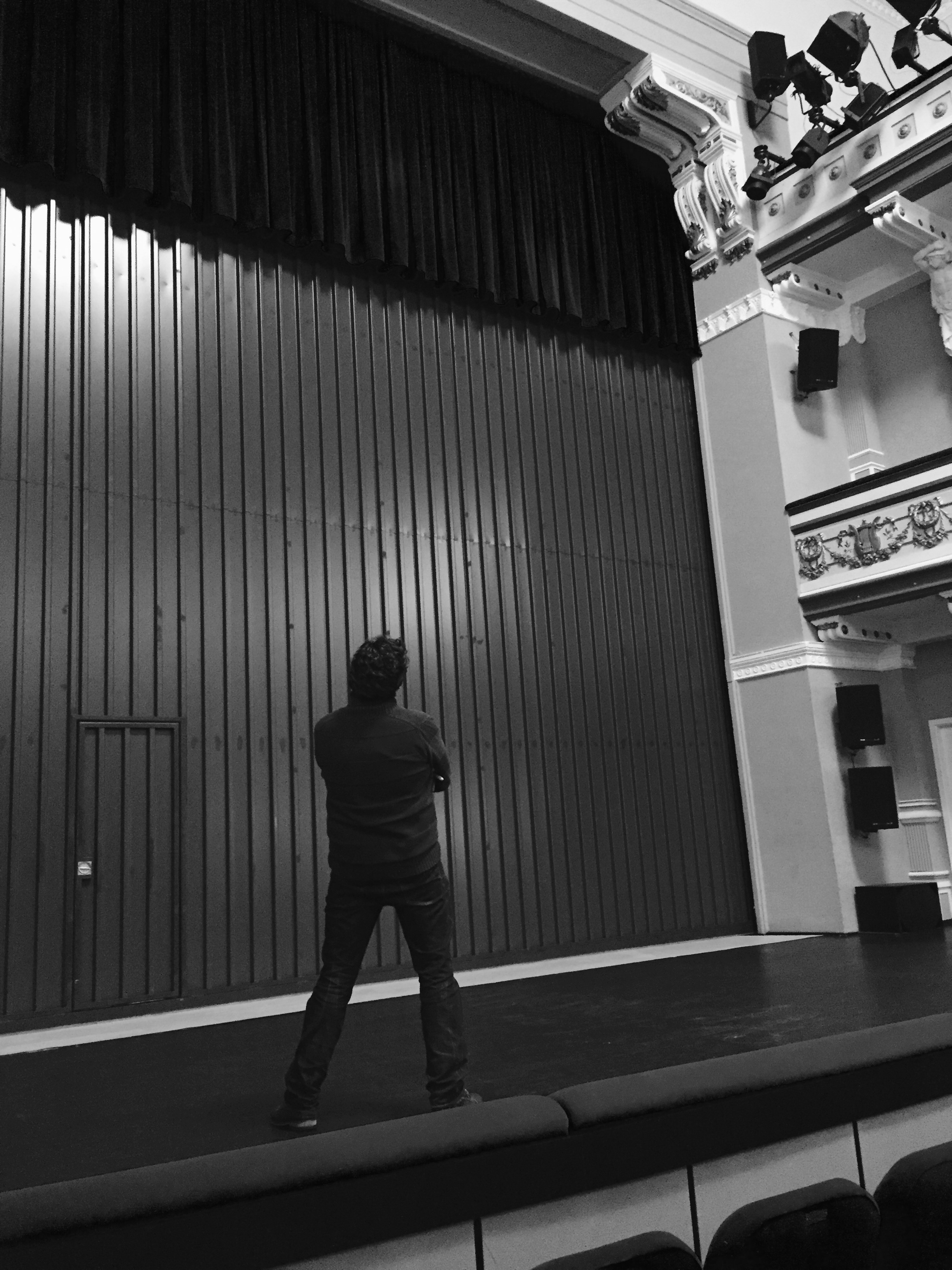 Boris C. Motzki auf der Bühne des Landestheater Eisenach, beim Betrachten des Eisernen Vorhangs